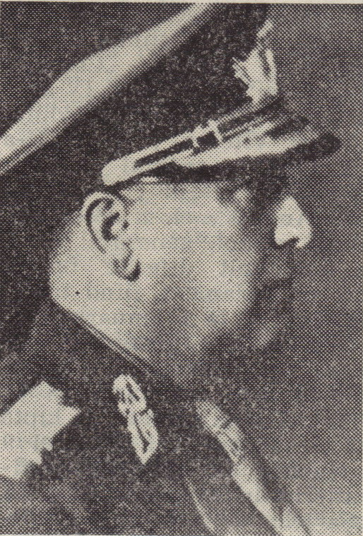 Generalul român Ilie Antonescu (1894-1974)